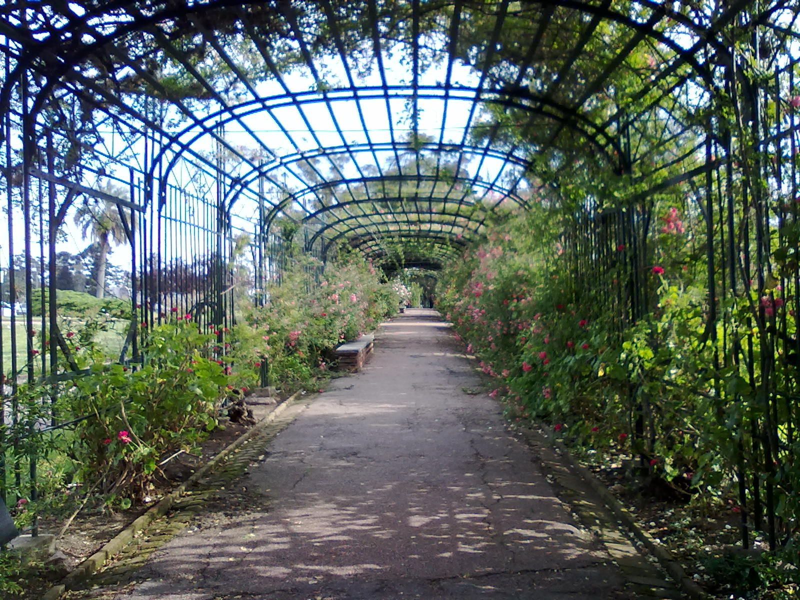 Rosedal